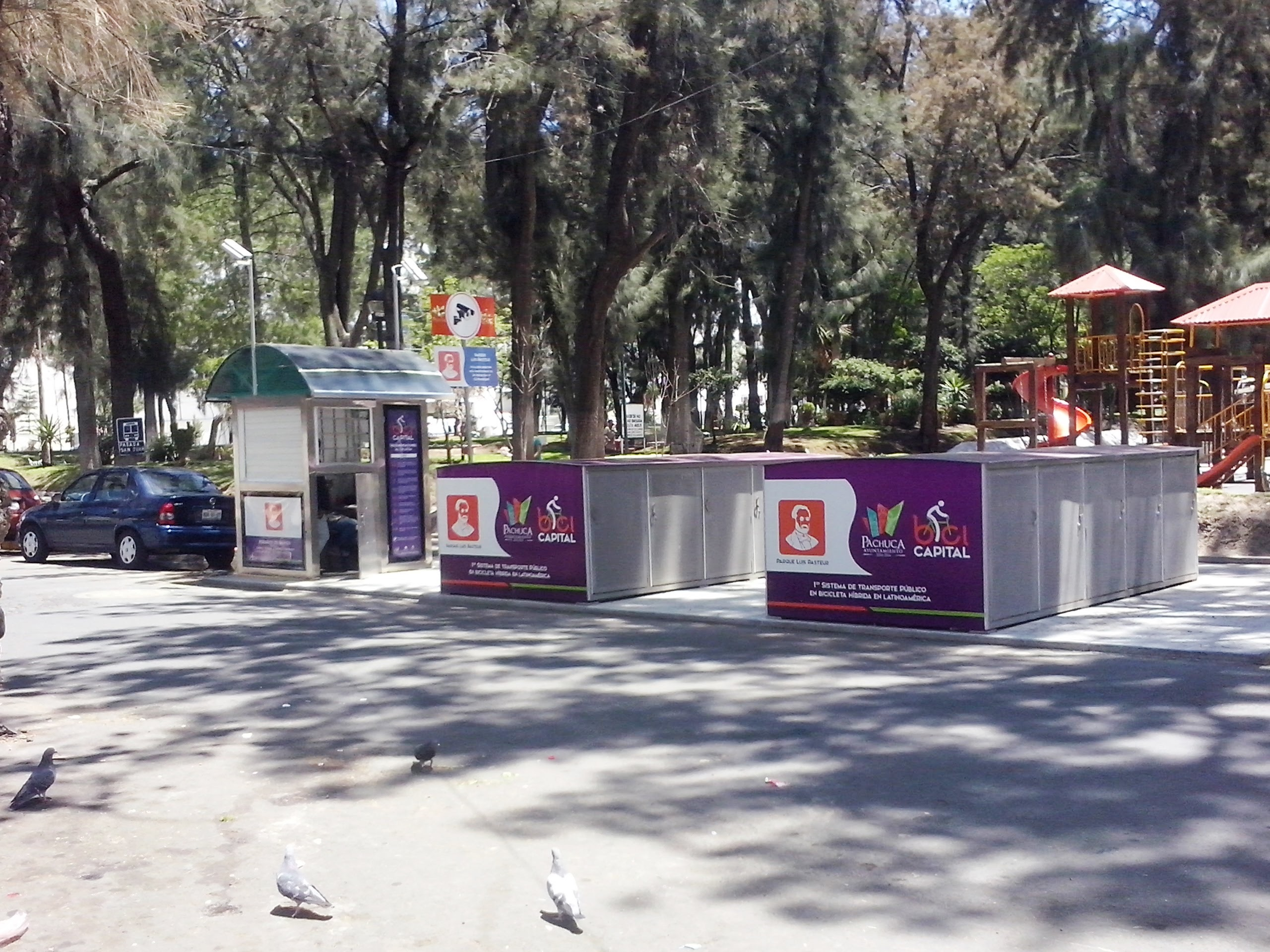 Estación de Bicicletas, Pachuca